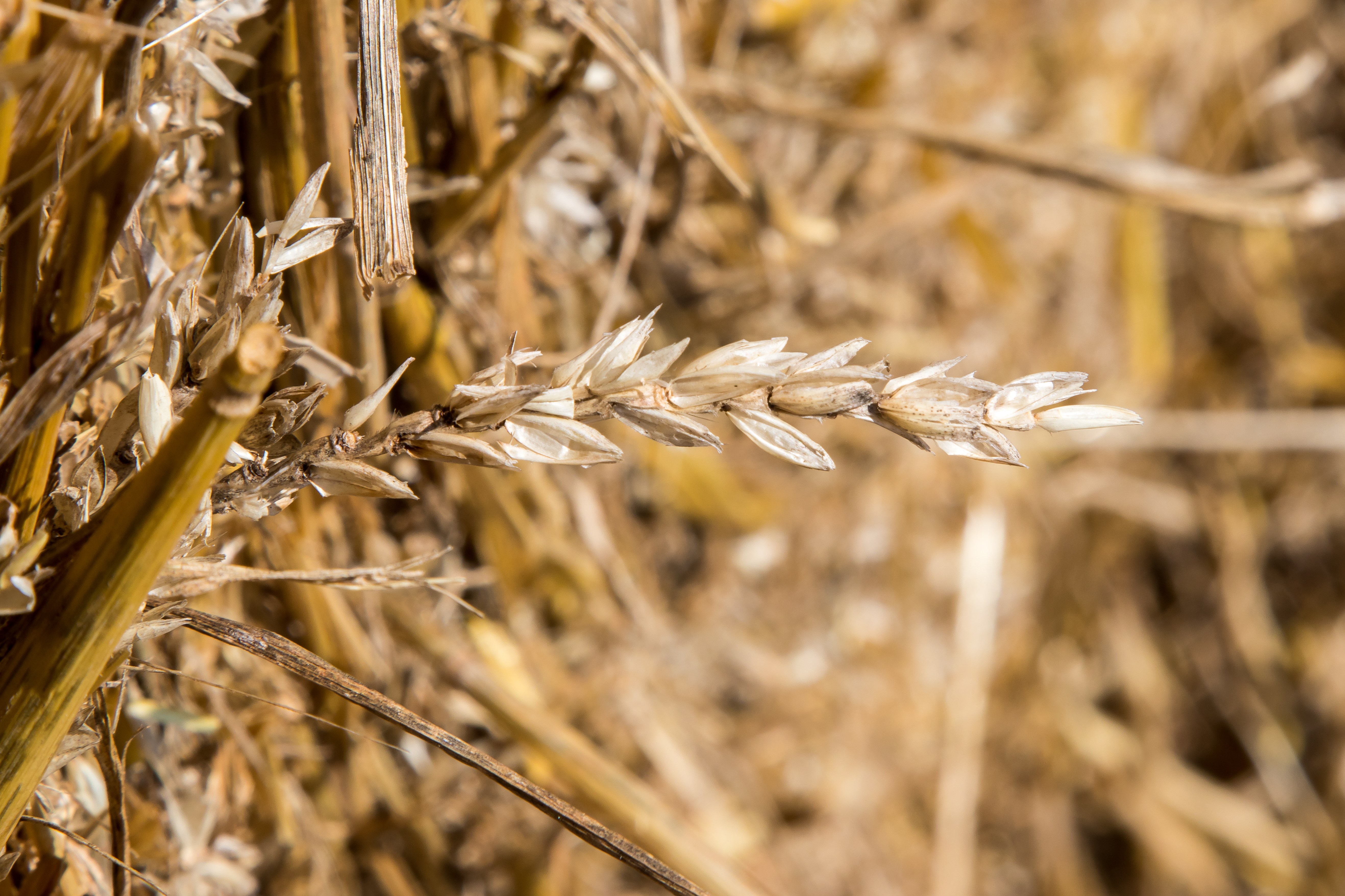 Gedroschenes Weizenstroh(Detailaufnahme)